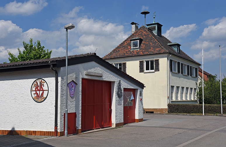 Feuerwehrmagazin und altes Schulhaus